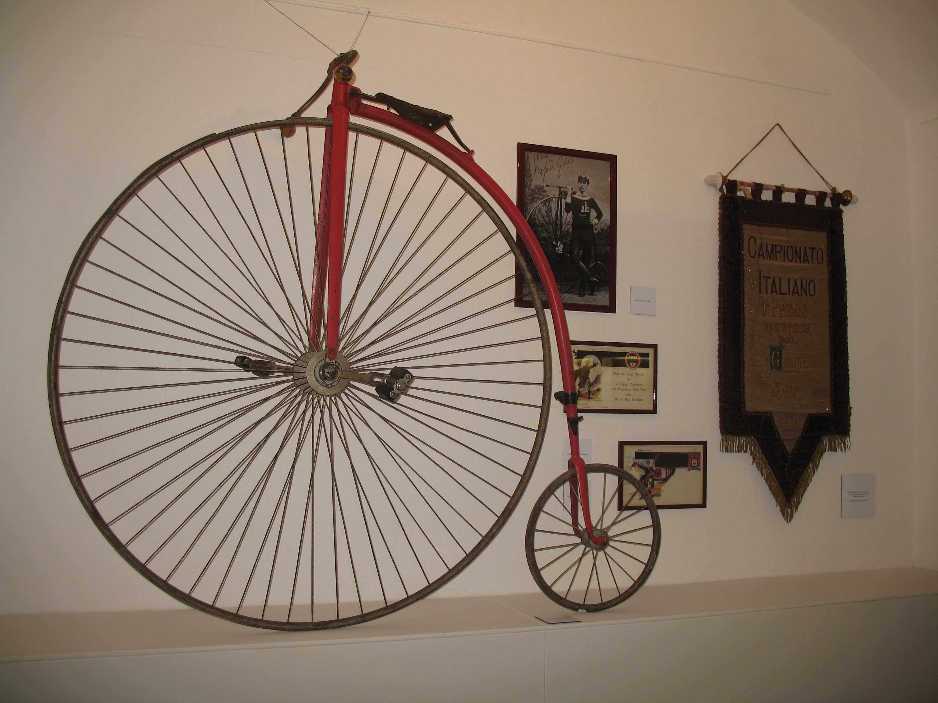 Un antico velocipede - Museo della Storia del Genoa, Genova, Italia.